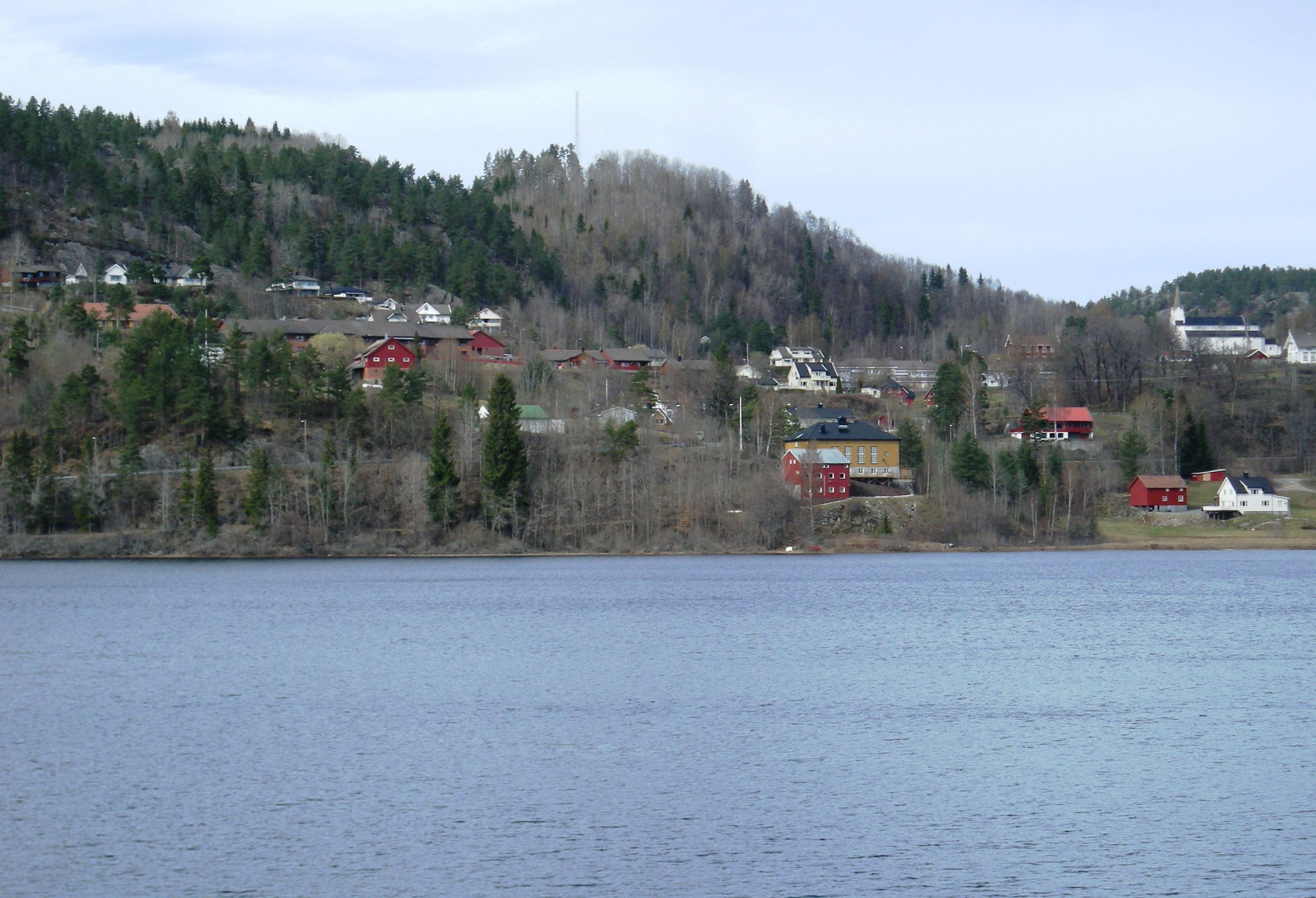 Gjerstadvatnet med Gjerstad kirke i bakgrunnen